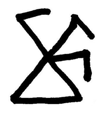 Skisse av bumerke i segl fra lagrettesmann Aslak Gundersen Mørfjær, 1586, ifølge Kristen Weierholt